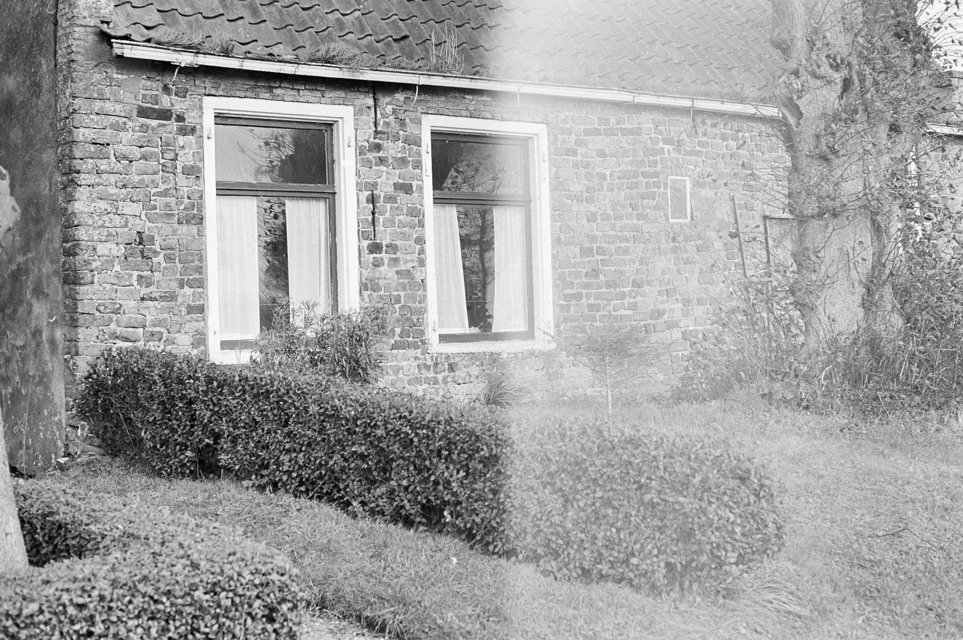 Voormalig Pastorie: Voorgevel met gedeelte van tuin (opmerking: Foto is overbelicht)